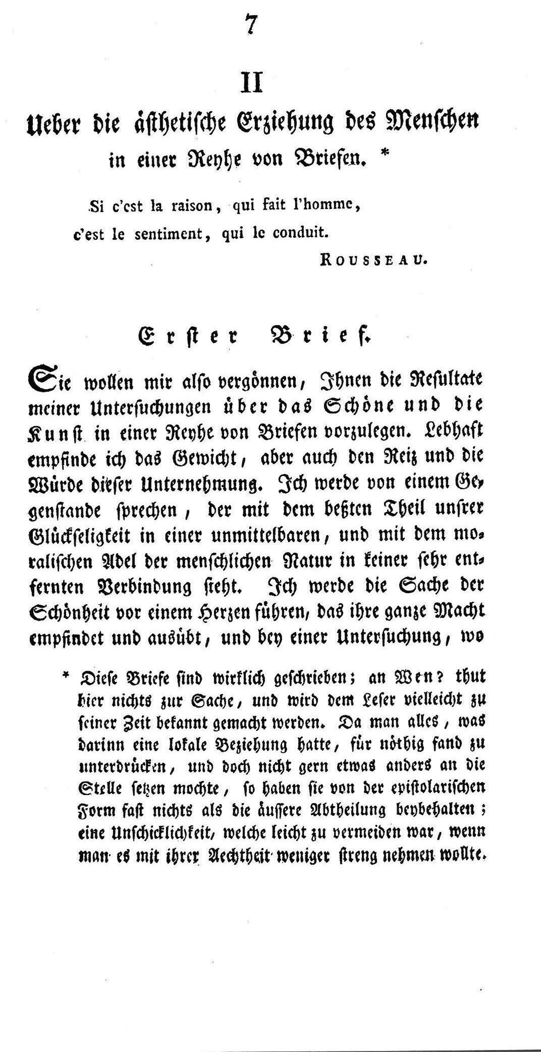 Friedrich Schiller: Über die ästhetische Erziehung des Menschengeschlechts 1. Brief S. 1, Faksimile aus den Horen